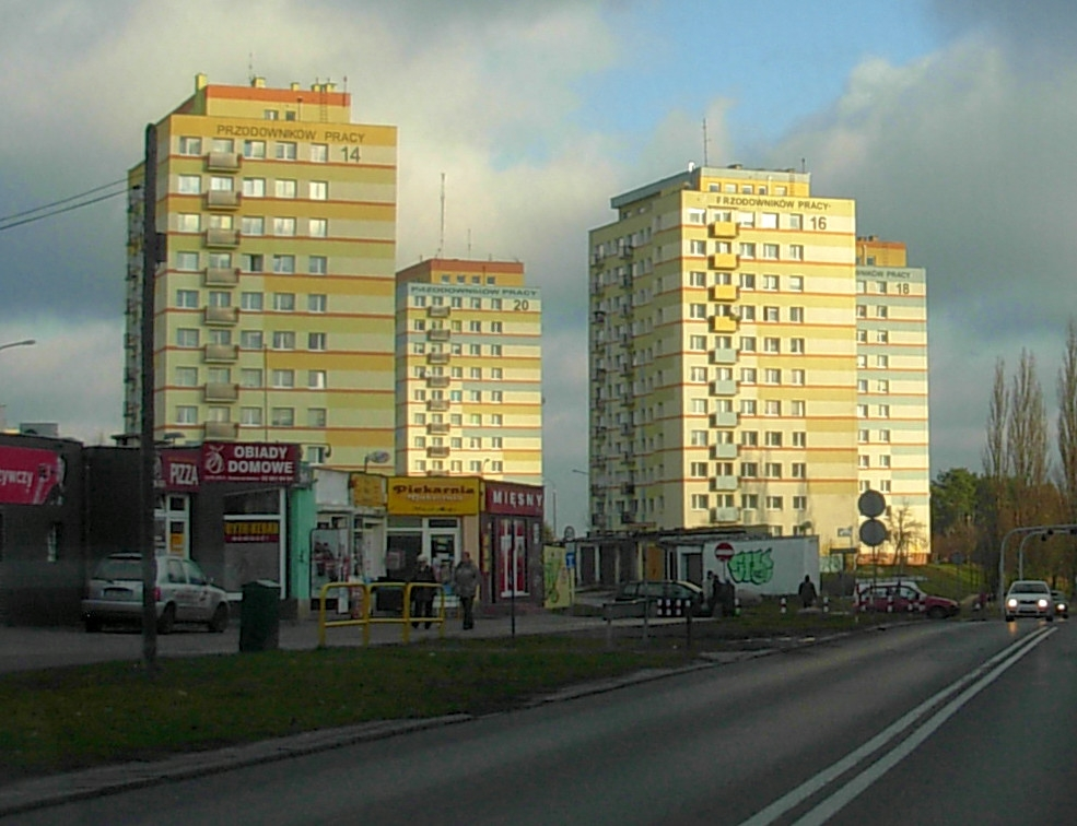 Ulica Planu 6-letniego na Kapuściskach w Bydgoszczy